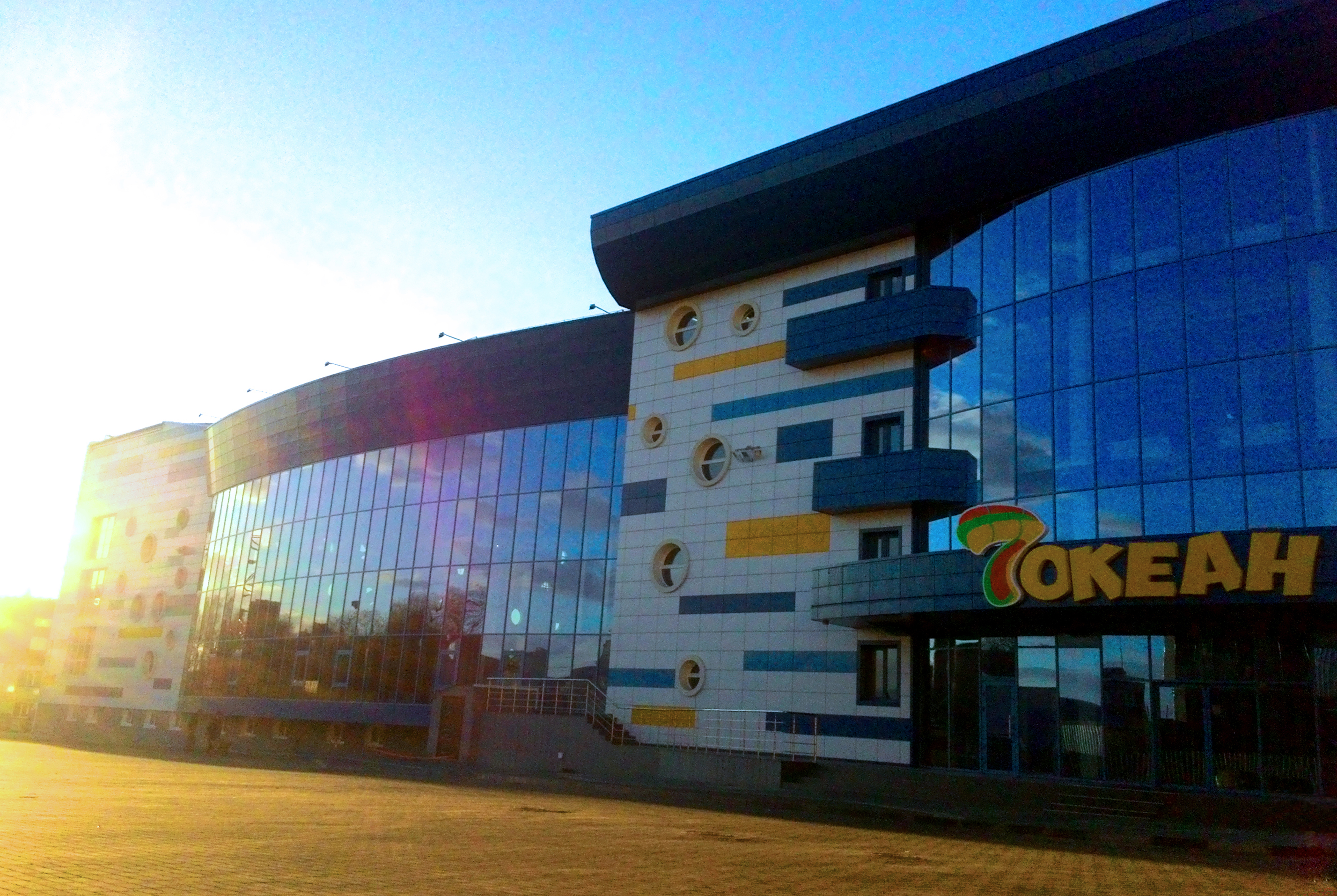 фасад